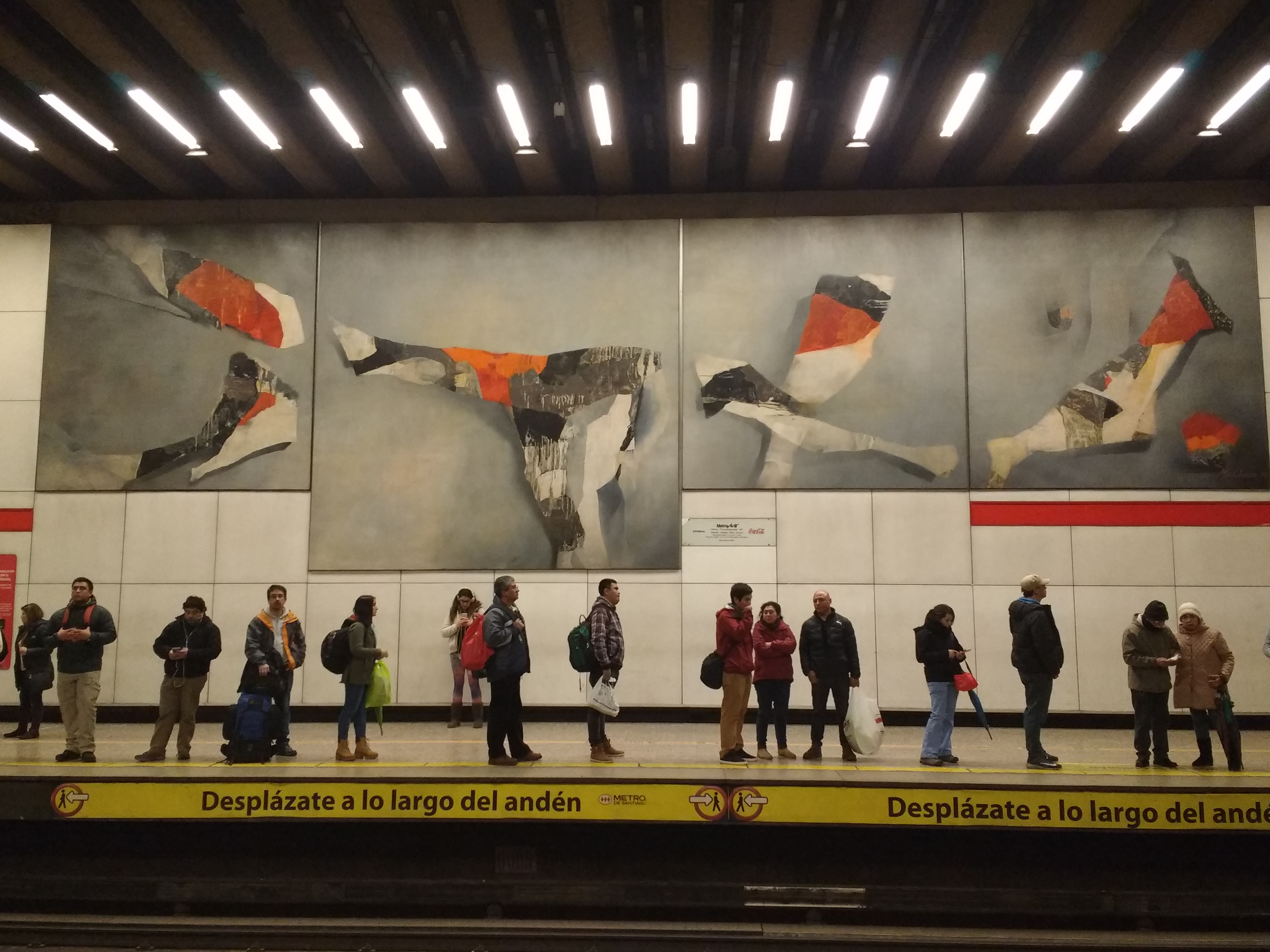 Costelacion II (óleo sobre tela y espejos, 380 m²; 1994), obra de Pablo Mc-Clure en la estación de metro Los Héroes, Santiago de Chile.